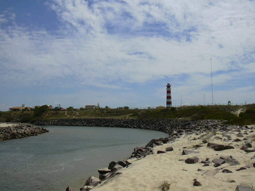 O arroio Chuí e o farol na fronteira entre o Brasil e o Uruguai. Localizado na cidade de Sta. Vitória do Palmar (9kms de distância)